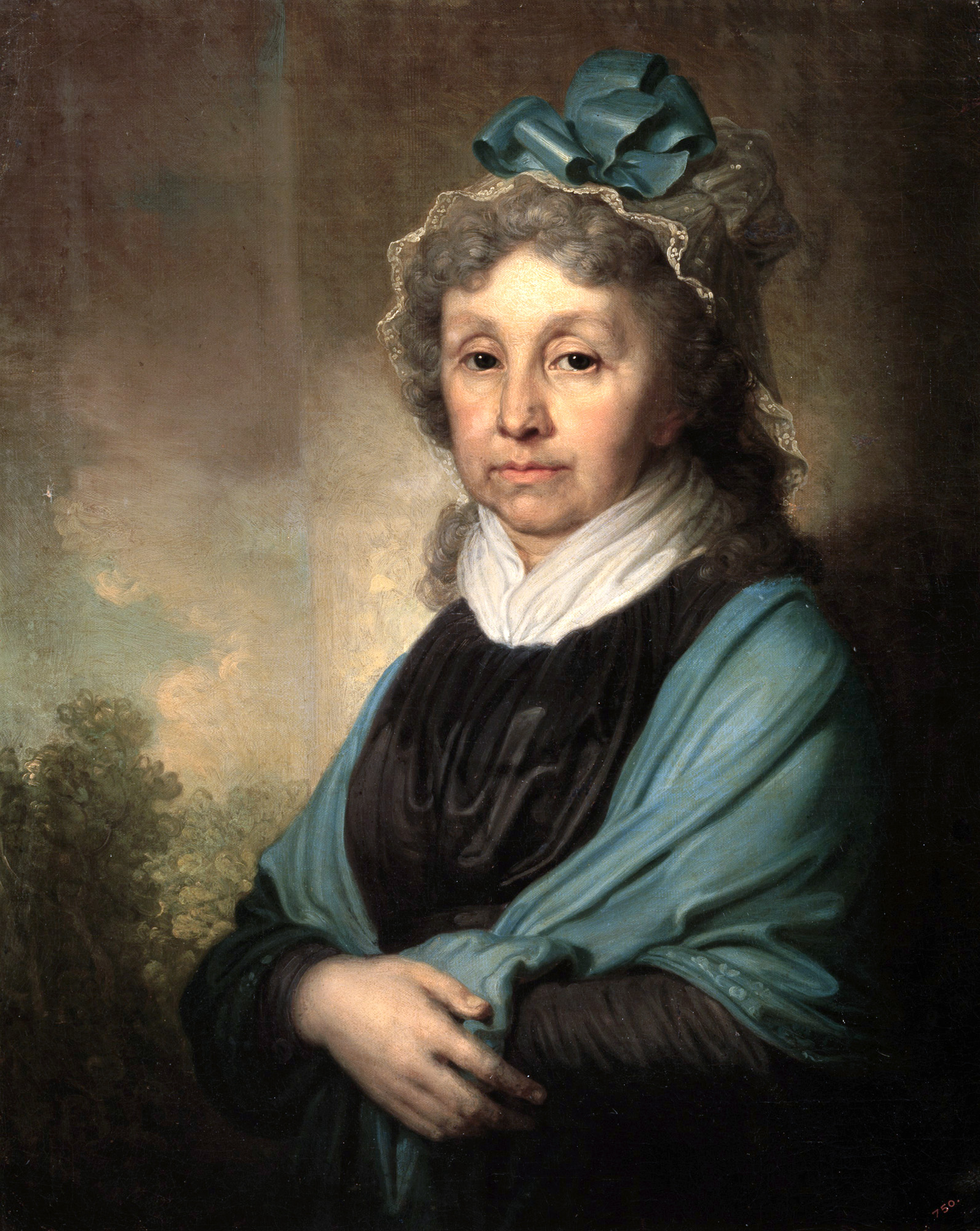 Анна Сергеевна Безобразова (1746–1809), урожденная княжна Урусова, родная сестра Варвары Сергеевны Васильевой, супруги сенатора и государственного казначея барона А.И. Васильева, портреты которых также написал Боровиковский. Погребена на Лазаревском кладбище Александро-Невской лавры в Санкт-Петербурге.